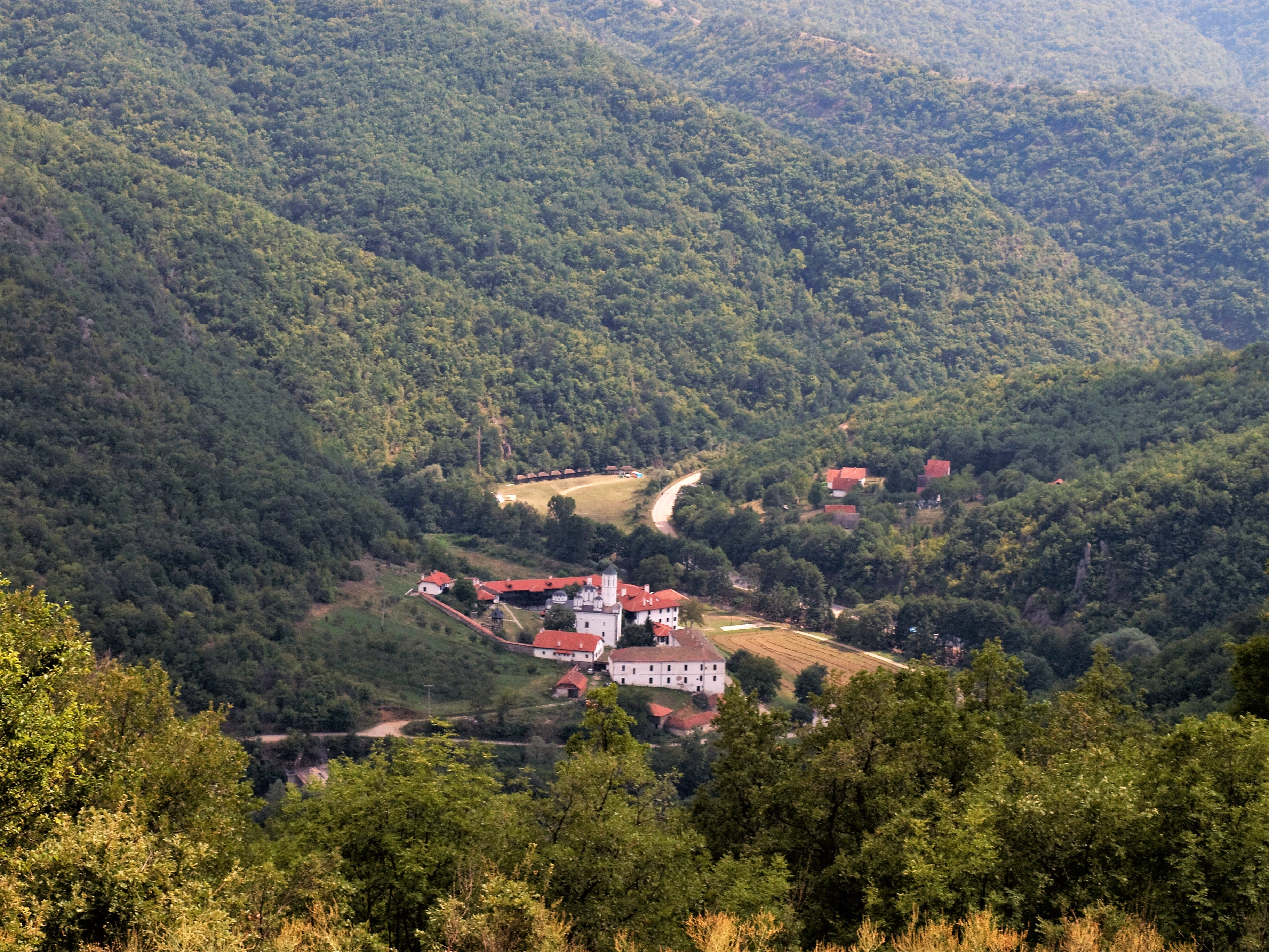 Prohor Pčinjski, a panoramic image from the north